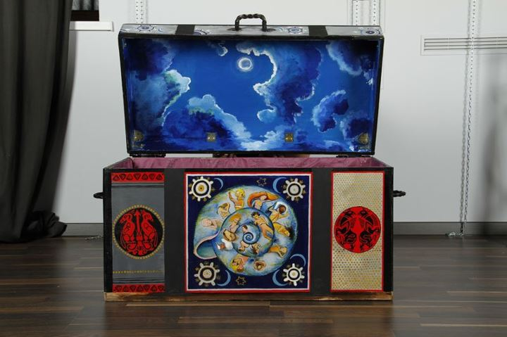 Сундук сновидений в Музее Сновидений. Художник: Екатерина Балицкая.